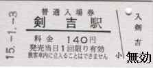 剣吉駅普通入場券